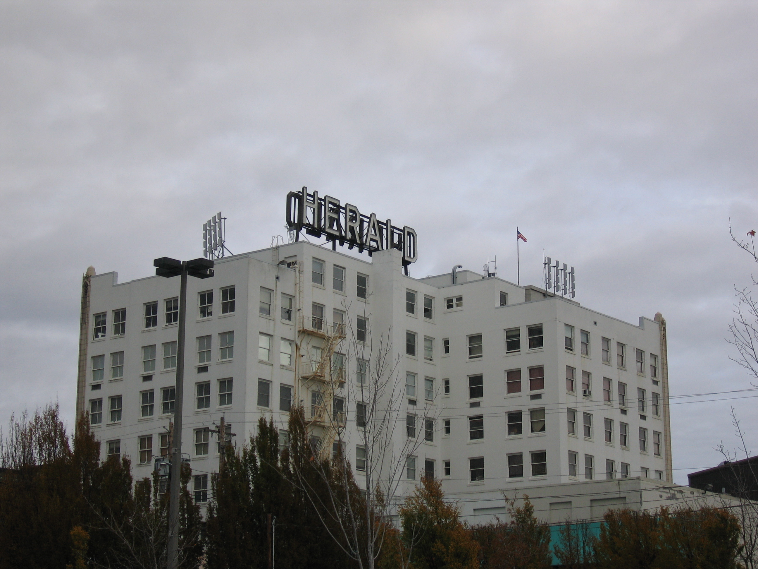 Bellingham